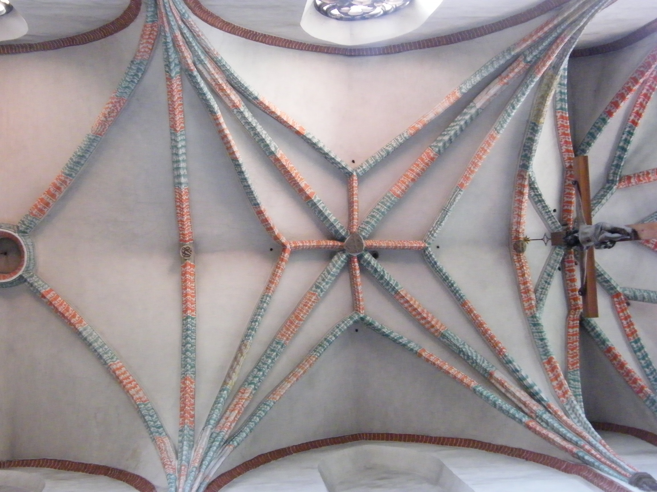 Wrocław, kościół p.w. Bożego Ciała, 2 ćw. XV